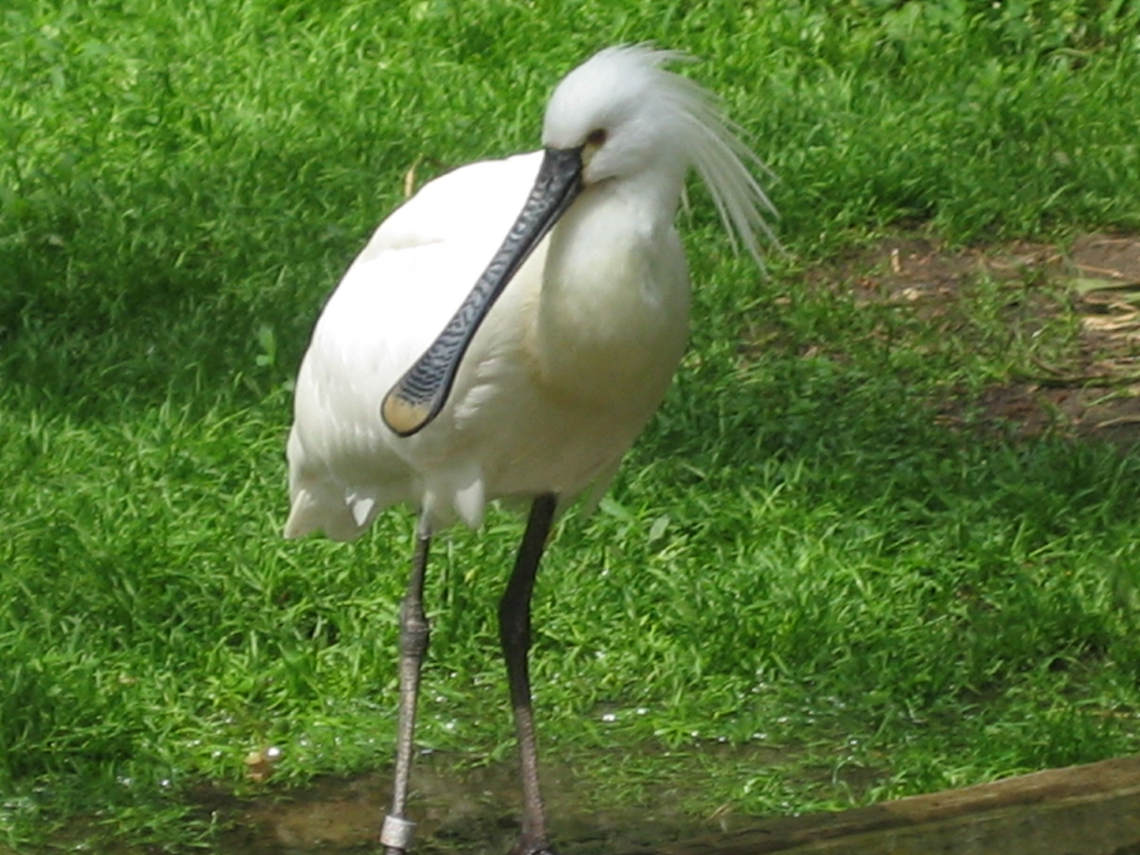 Löffler im Tiergarten Nürnberg